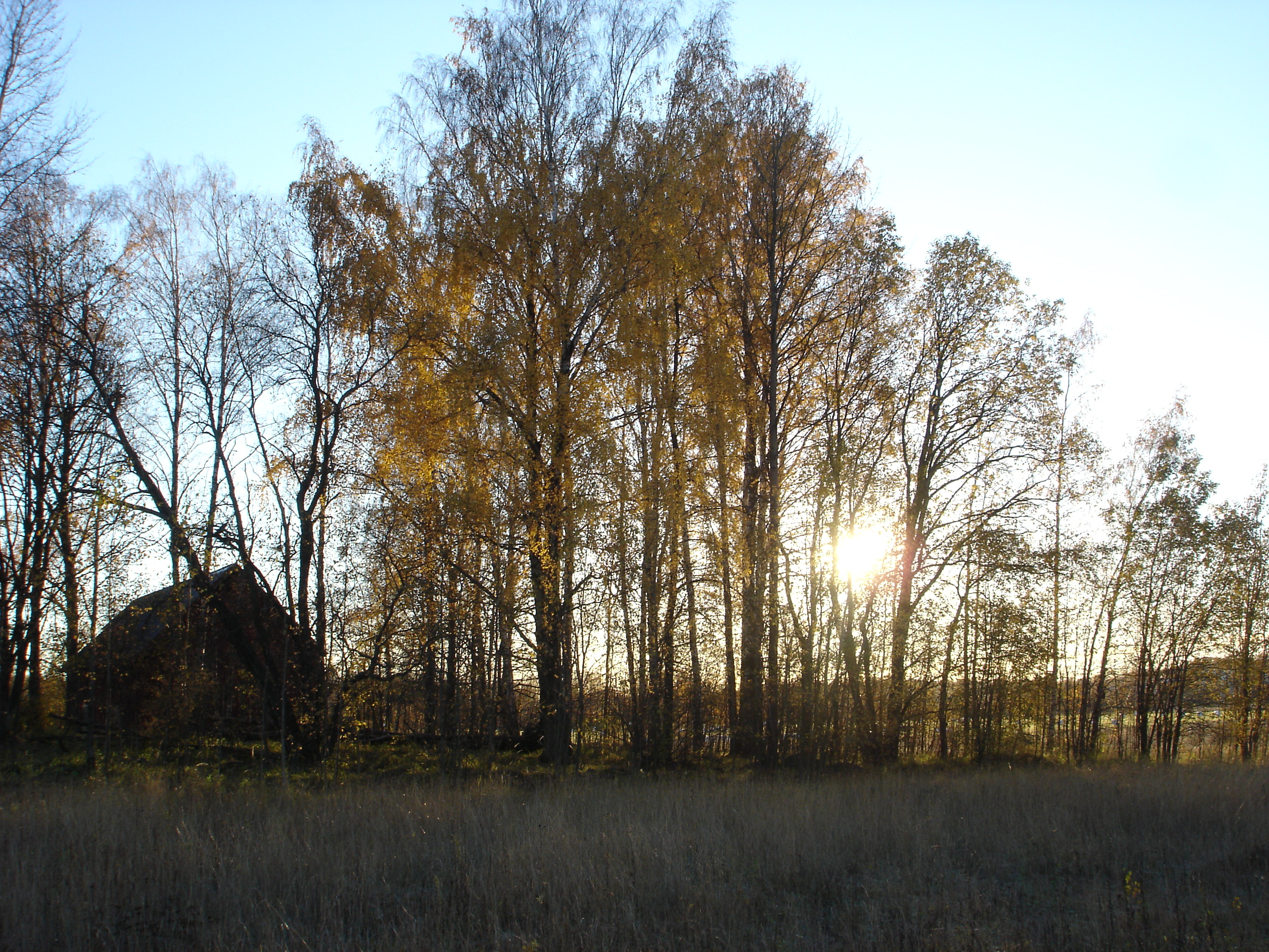 Otoño en Viikki